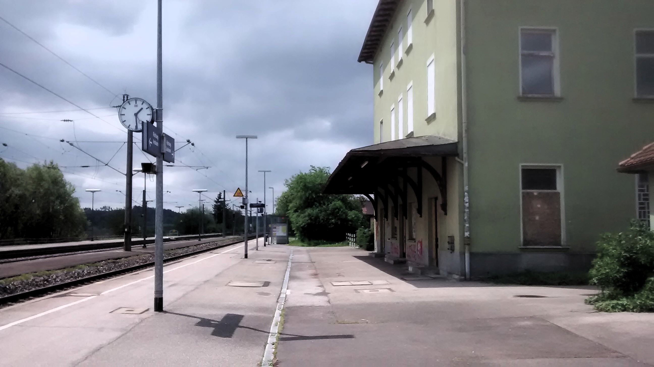 Bahnhof Dombühl mit Bahnhofsgebäude, Blick nach Südwesten; Mai 2016